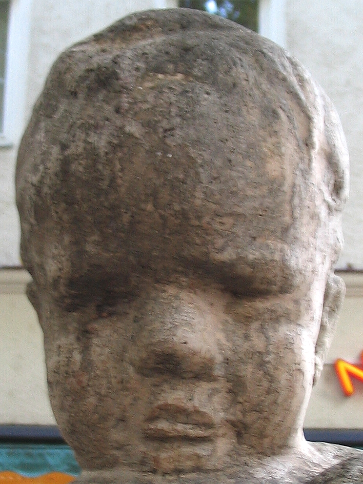 Der Kopf der Figur eines kleinen Jungen auf dem Erbsenbrunnen in Stuttgart-Bad Cannstatt. Für die Figur stand der spätere Bundespräsident Richard von Weizsäcker Modell.